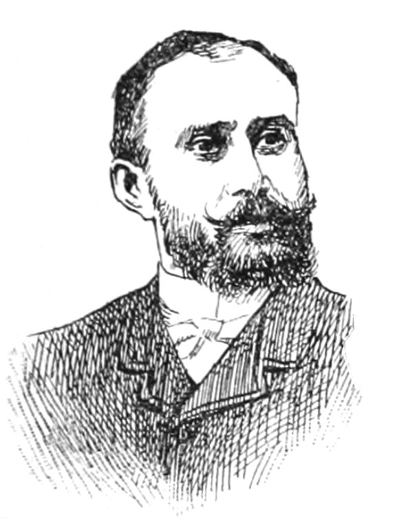 "La Nouvelle Chambre" : "Basly".